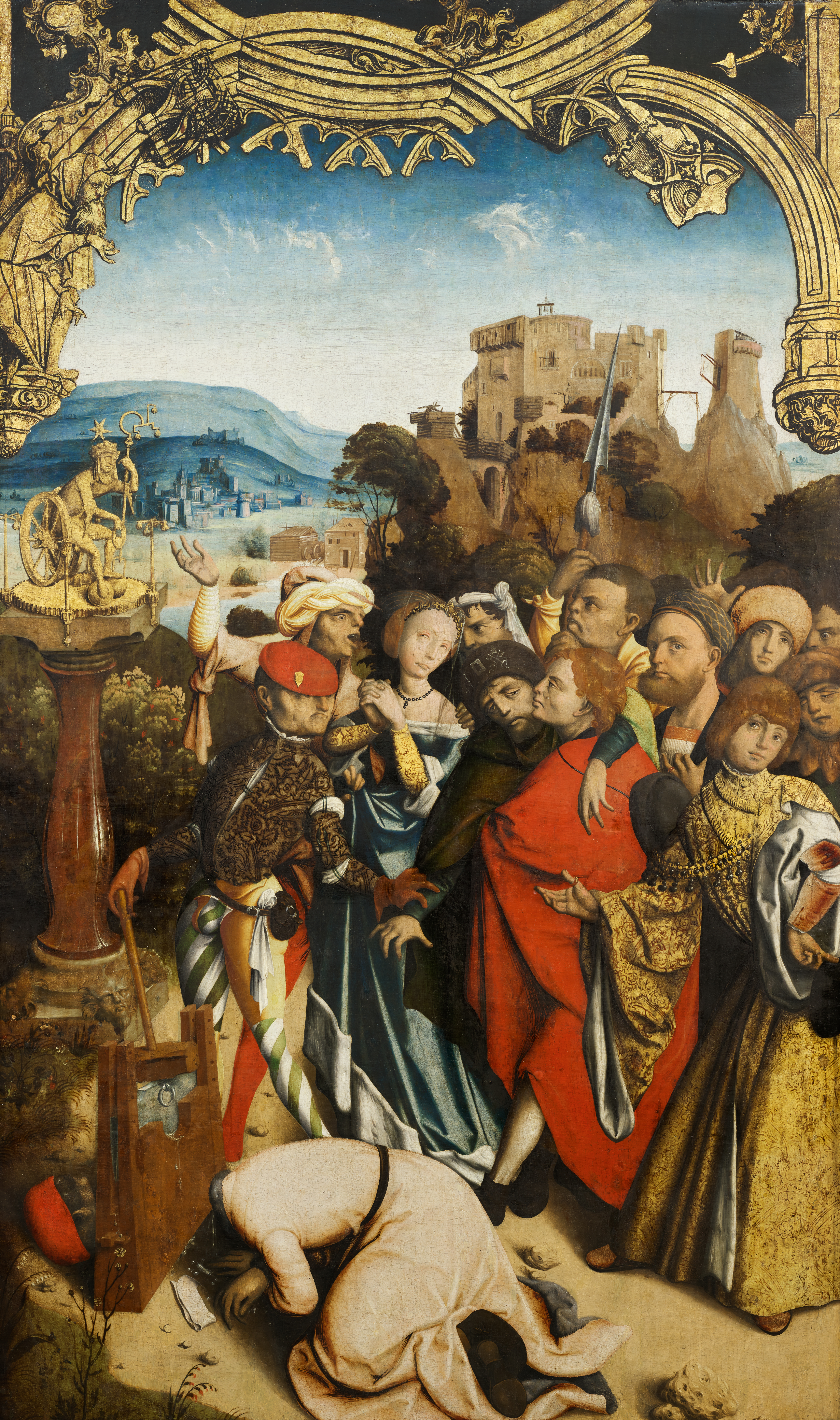 Krainburger Altar, Szene: Martyrium der Heiligen Cantius, Cantianius und Cantianilla